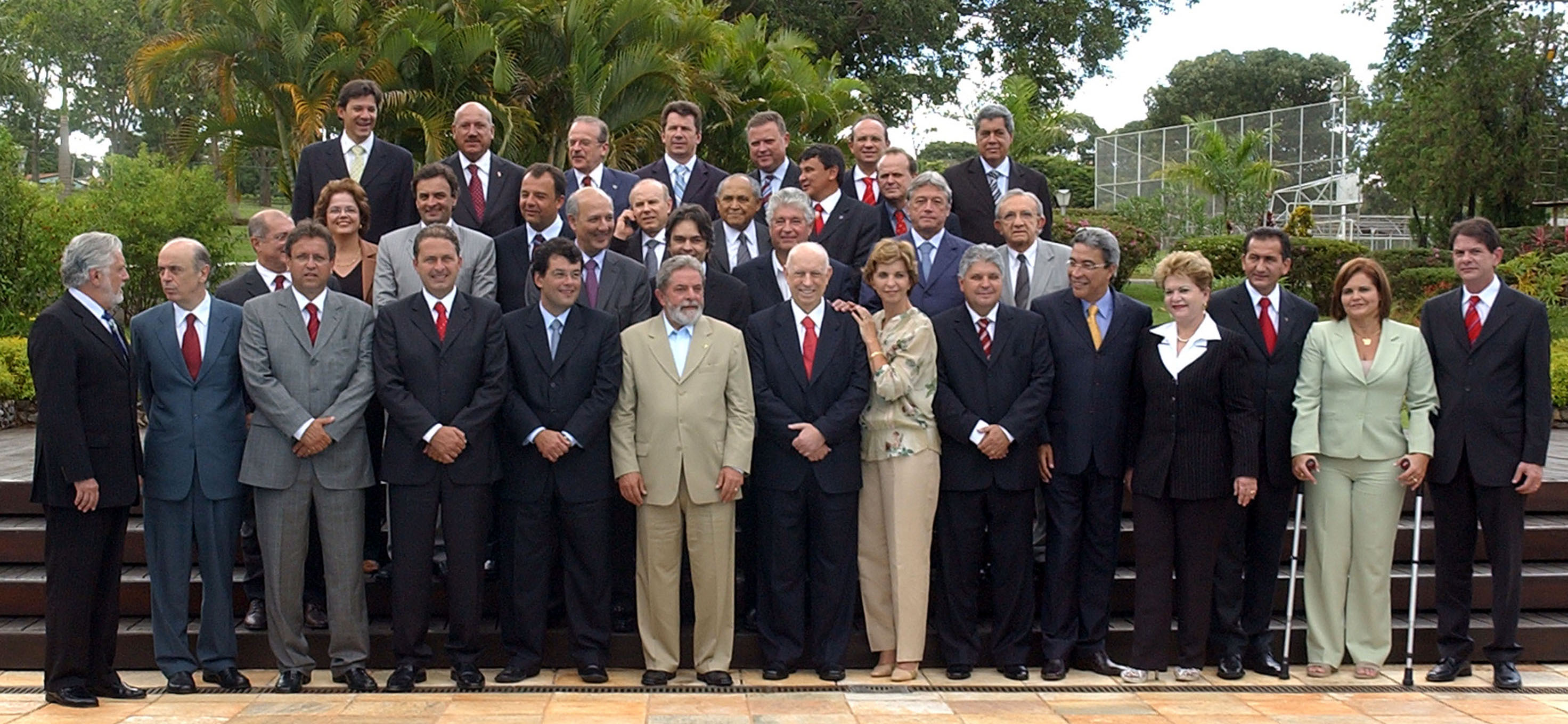 O presidente do Brasil reúne-se com os governadores dos 26 estados e do Distrito Federal, 6 de março de 2007. Legenda: No degrau mais alto, da esquerda para a direita: ministro Fernando Haddad, gov. Luís Henrique da Silveira (Santa Catarina), ministro Tarso Genro, gov. Ivo Cassol (Rondônia), gov. Blairo Maggi (Mato Grosso), gov. Paulo Hartung (Espírito Santo) e gov. André Puccinelli (Mato Grosso do Sul). Na fileira central, da esquerda para a direita: ministro Paulo Bernardo Silva, ministra Dilma Rousseff, gov. Aécio Neves (Minas Gerais), gov. Sérgio Cabral Filho (Rio de Janeiro), gov. José Roberto Arruda (Distrito Federal), ministro Guido Mantega (ao celular), gov. Cássio Cunha Lima (Paraíba), gov. Ottomar Pinto (Roraima), gov. Roberto Requião (Paraná), gov. Wellington Dias (Piauí), desconhecido, gov. Teotônio Vilela Filho (Alagoas) e gov. Jackson Lago (Maranhão). Na fileira inferior, da esquerda para a esquerda: gov. Jaques Wagner (Bahia), gov. José Serra (São Paulo), gov. Marcelo Miranda (Tocantins), gov. Eduardo Campos (Pernambuco), gov. Eduardo Braga (Amazonas), presidente Luís Inácio Lula da Silva, vice-presidente José Alencar, gov. Yeda Crusius (Rio Grande do Sul), gov. Alcides Rodrigues (Goiás), Marcelo Déda (Sergipe), gov. Wilma de Faria (Rio Grande do Norte), gov. Waldez Góis (Amapá), Ana Júlia Carepa (Pará) e gov. Cid Gomes (Ceará).O único governador ausente foi Binho Marques, do Acre.